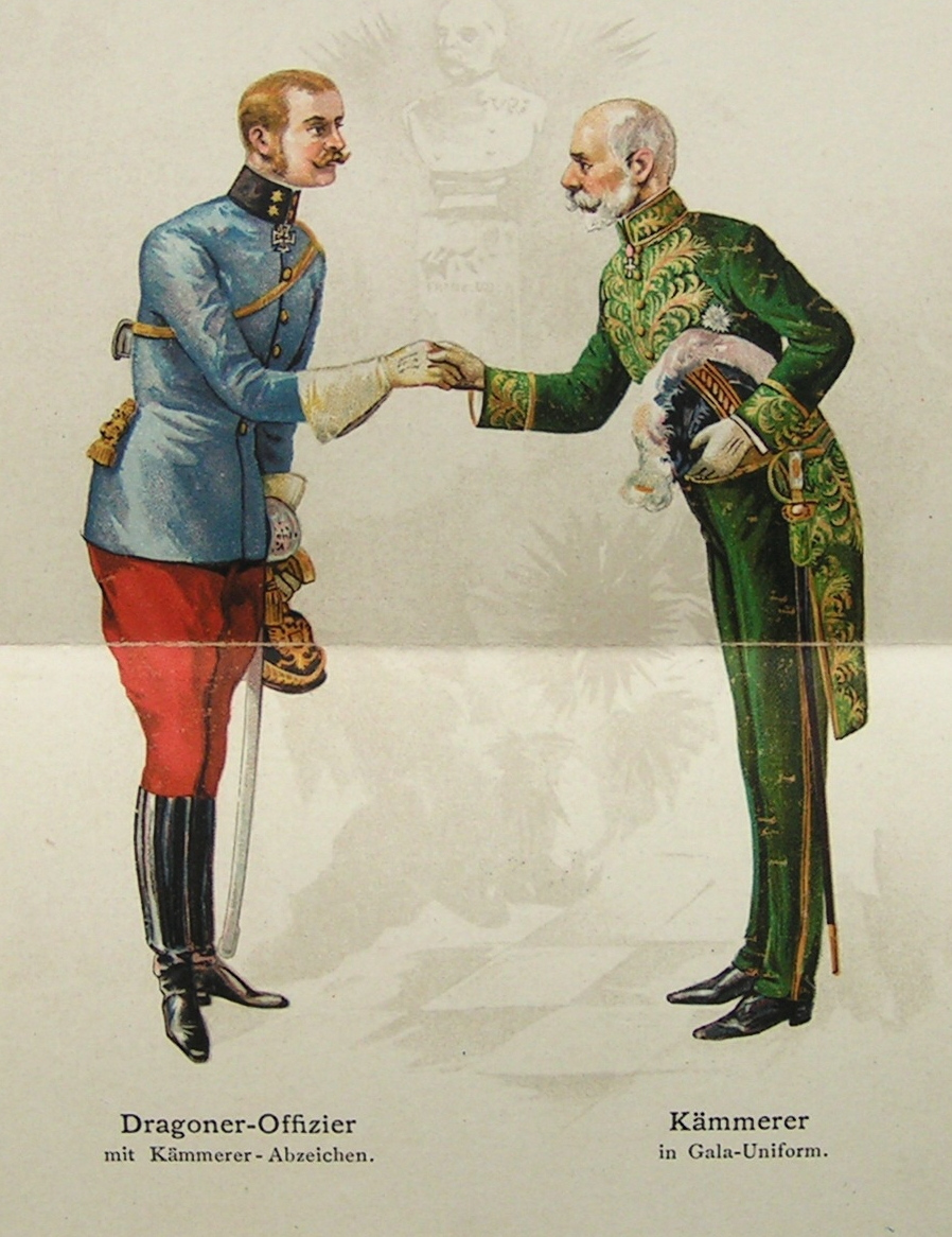 Uniforma-komoří